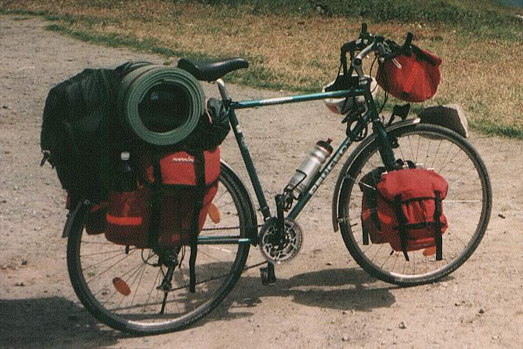 Ein voll bepacktes Trekkingrad Dieses Foto wurde von Martin Hawlisch fotografiert und unter der GFDL veröffentlicht.